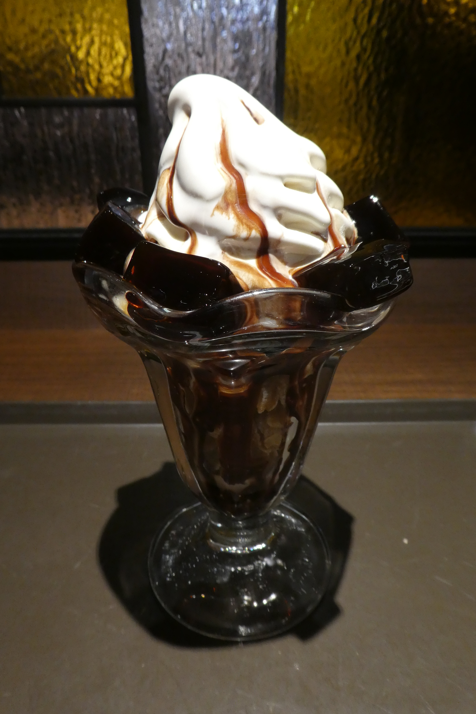 日本の喫茶店で提供されるコーヒーゼリーパフェの一例。